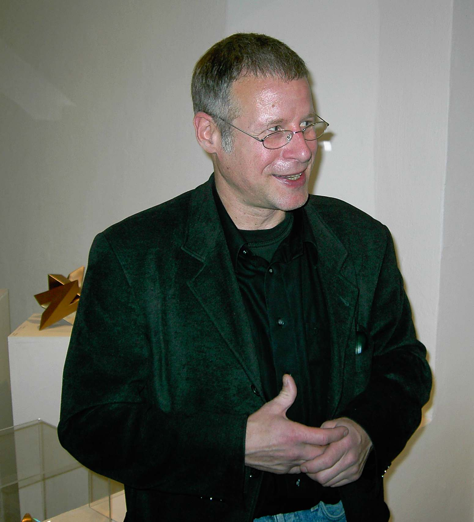 Maximilian Verhas, deutscher Bildhauer, in der Galerie Sculptur, Bamberg; Vernissage am 04.04.2007